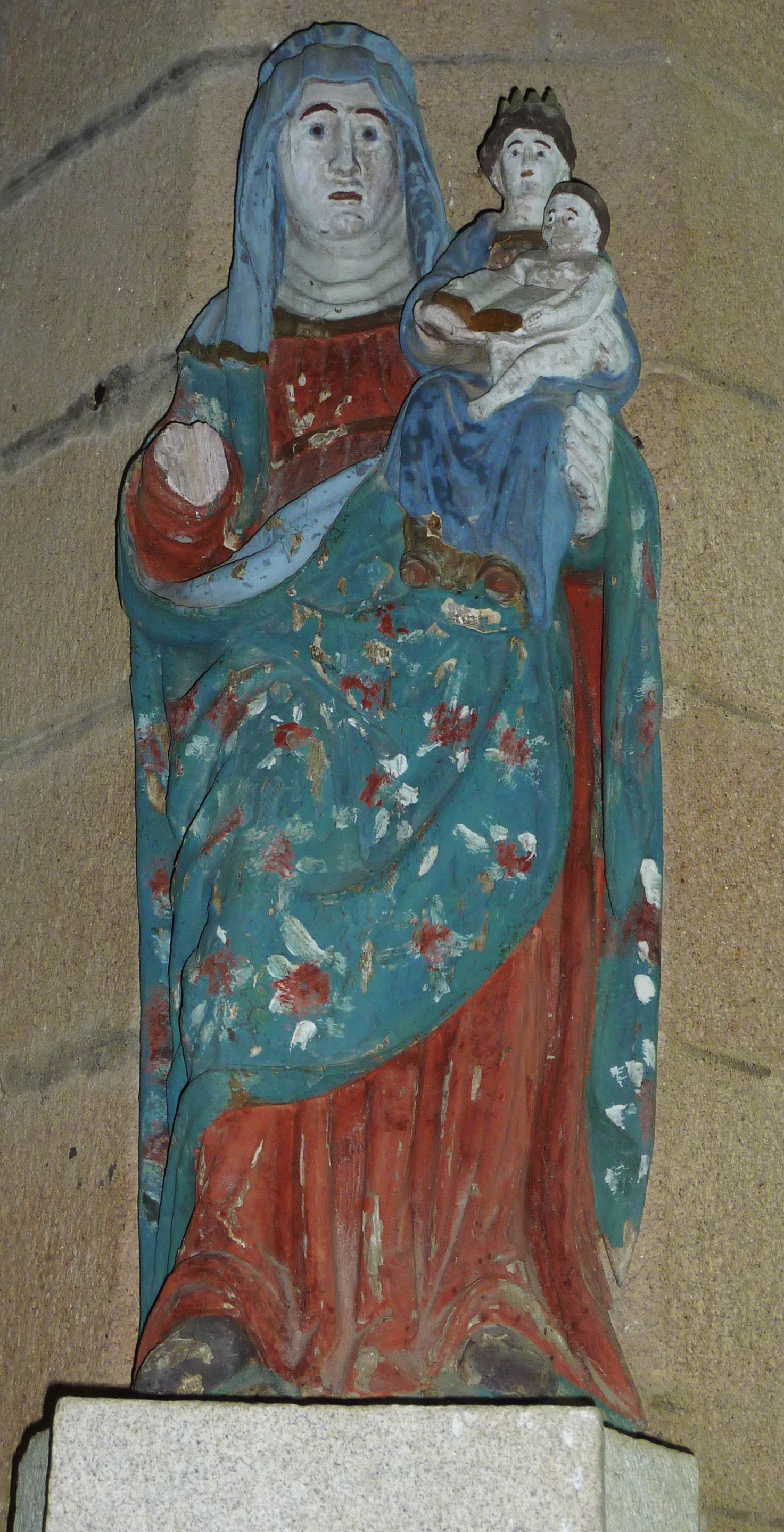 Plougonven: église paroissiale, rare statue triple de Sainte-Anne (représentée avec la Vierge Marie et l'Enfant Jésus)